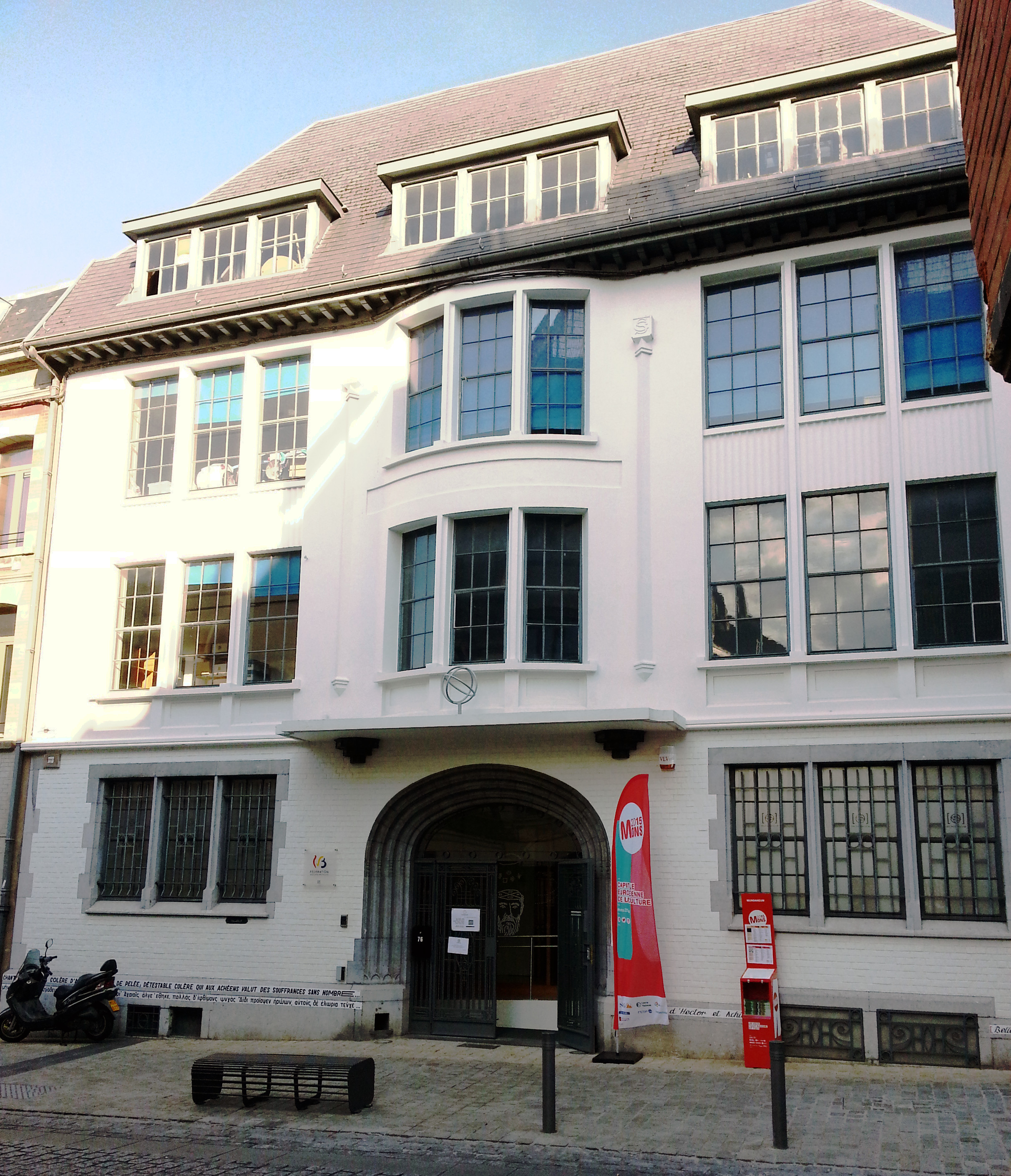 Vorderansicht des Mundaneums in Mons